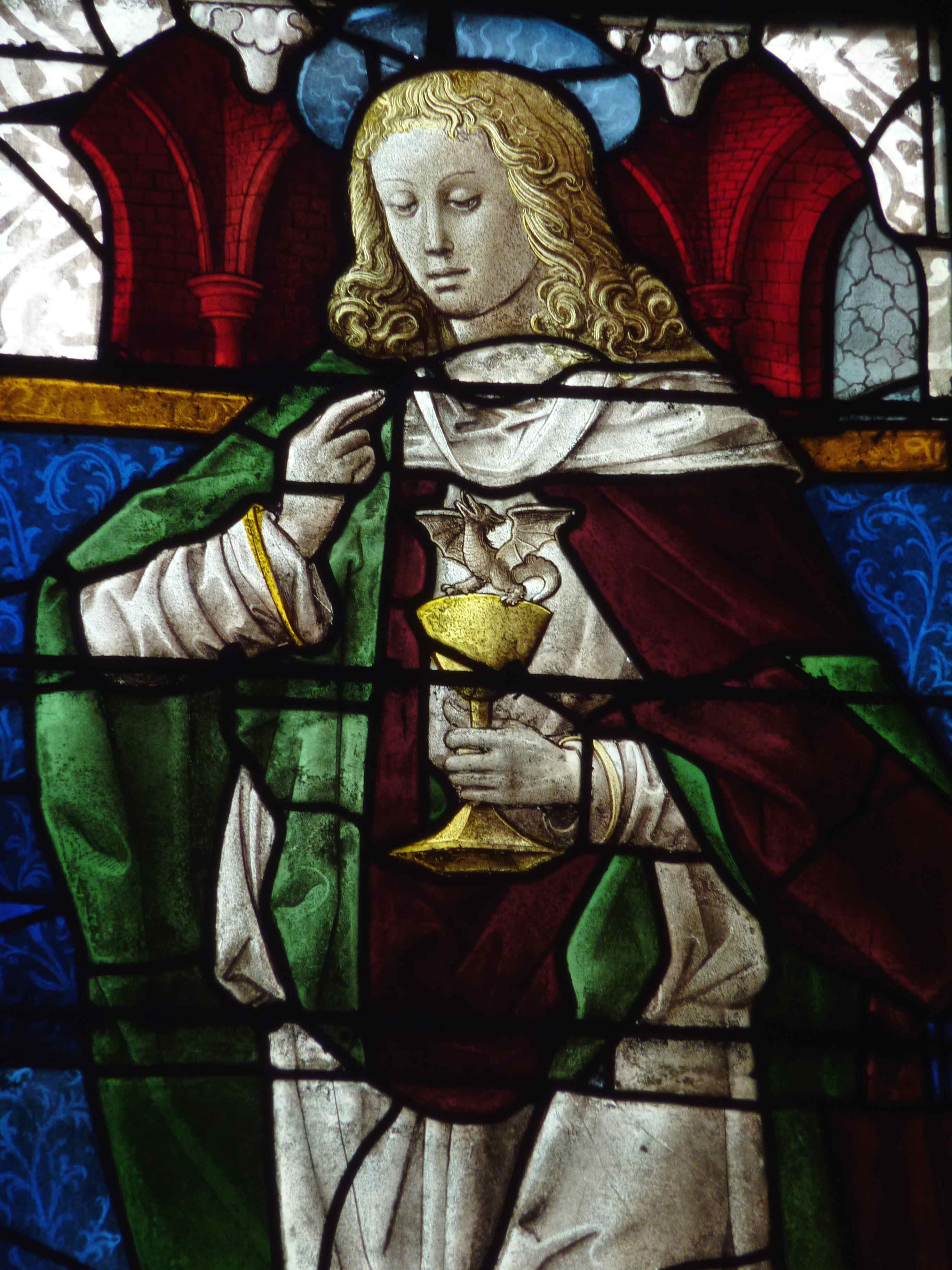 Katholische Kirche Saint-Pierre in Dreux im Département Eure-et-Loir (Centre-Val de Loire/Frankreich), Bleiglasfenster (baie 29) in der Vinzenzkapelle, aus dem 16. und 17. Jahrhundert, Darstellung: Maria (links), Pietà (Mitte), Apostel Johannes (rechts); hl. Sebastian (unten Mitte); Ausschnitt: Apostel Johannes